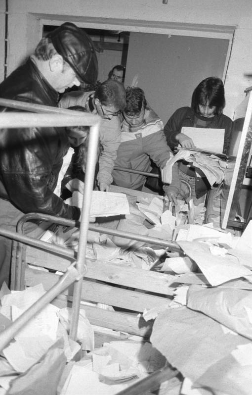 Berlin, Stasi-Zentrale gestürmt ADN-ZB/Uhlemann/15.1.90/Berlin: Demonstration/ Das Neue Forum hatte zu einer Demonstration vor die ehemalige Zentrale des Amtes für Nationale Sicherheit in Lichtenberg aufgerufen. Die Mehrzahl der vielen Tausenden ließ sich zu einem Akt des Vandalismus hinreißen. Demonstranten stürmen den Gebäudekomplex , drangen in Büroräume ein und verwüsteten sie. Nach Augenzeugenberichten zerfledderten sie Unterlagen und warfen Mobiliar aus dem Fenster.